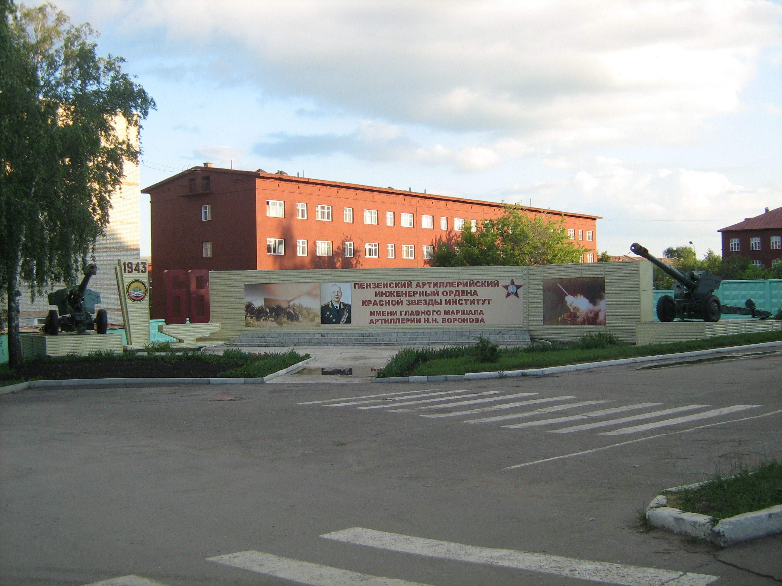 25 июня 2011 года